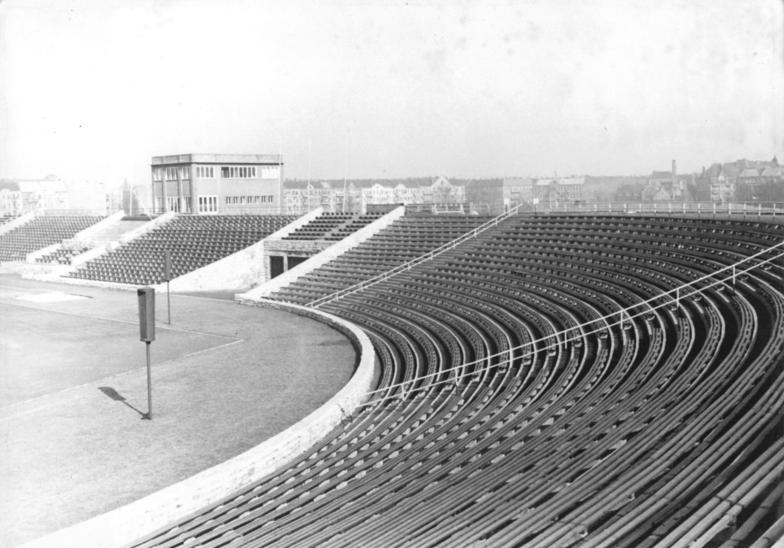 Berlin, Friedrich-Ludwig-Jahn-Stadion, Tribüne Zentralbild Funk 14 Mot. 9.3.1954 UBz: Blick auf die Zuschauertribüne im Friedrich Ludwig Jahn Stadion in Berlin Cantianstrasse. (Aufnahme vom 9.3.1954).